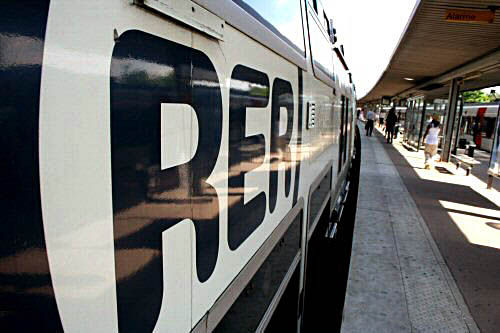 MI2N en gare de Conflans-Fin-d'Oise.